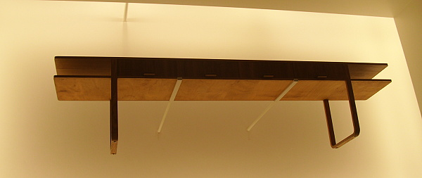 Sep Ruf Sideboard für Ludwig Erhard Pinakothek der Moderne München